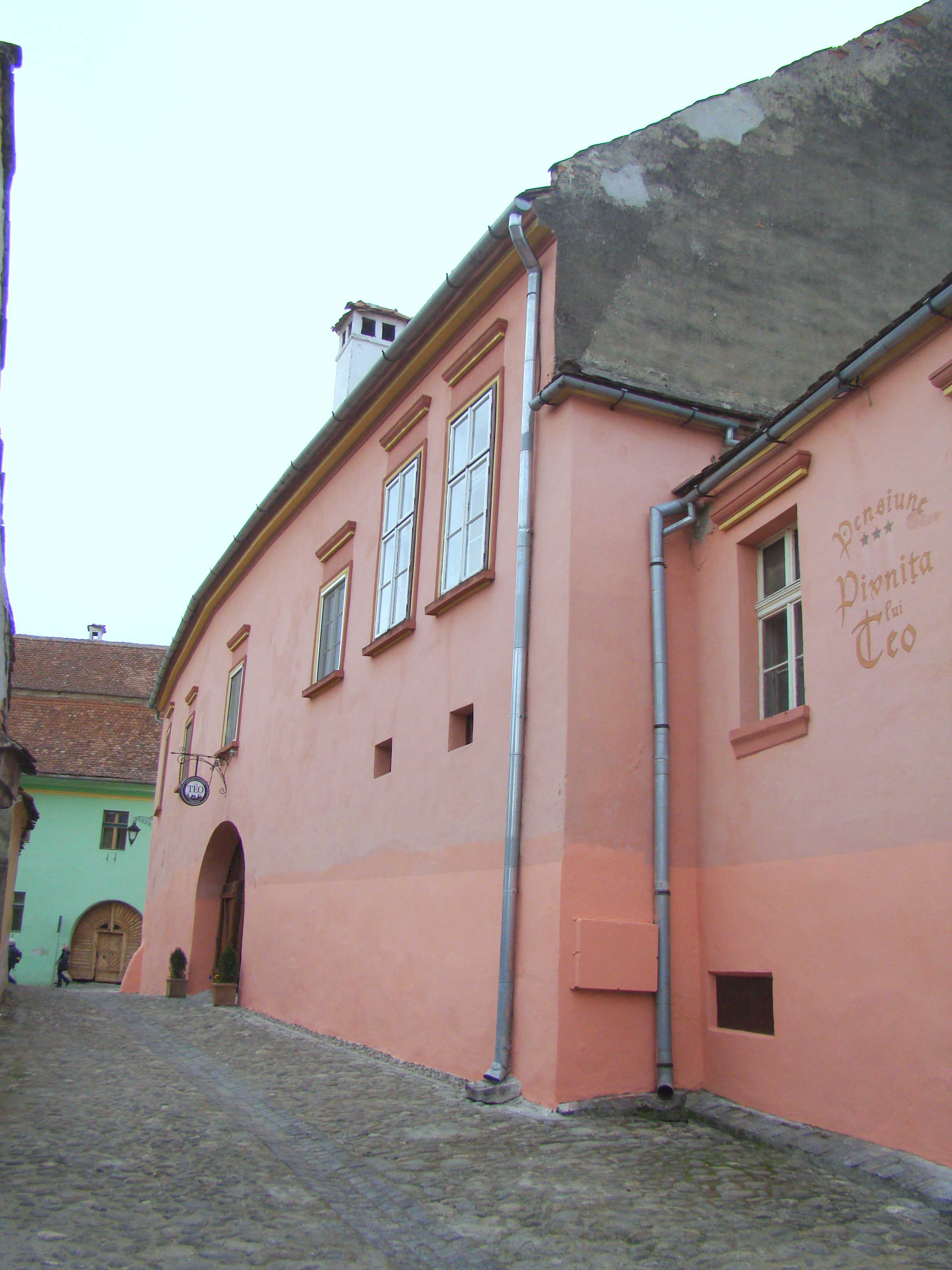 Casa „Sachsen Heim”, municipiul Sighișoara, str. Școlii 14 sec. XVIII, sec. XIX - XX